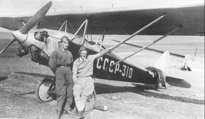 Это фотография лётчика-испытателя Кошица Д. А. и механика Подлесного Б. Н. на фоне самолёта АИР-3 во время перелёта Москва-Крым-Москва в 1929 году.